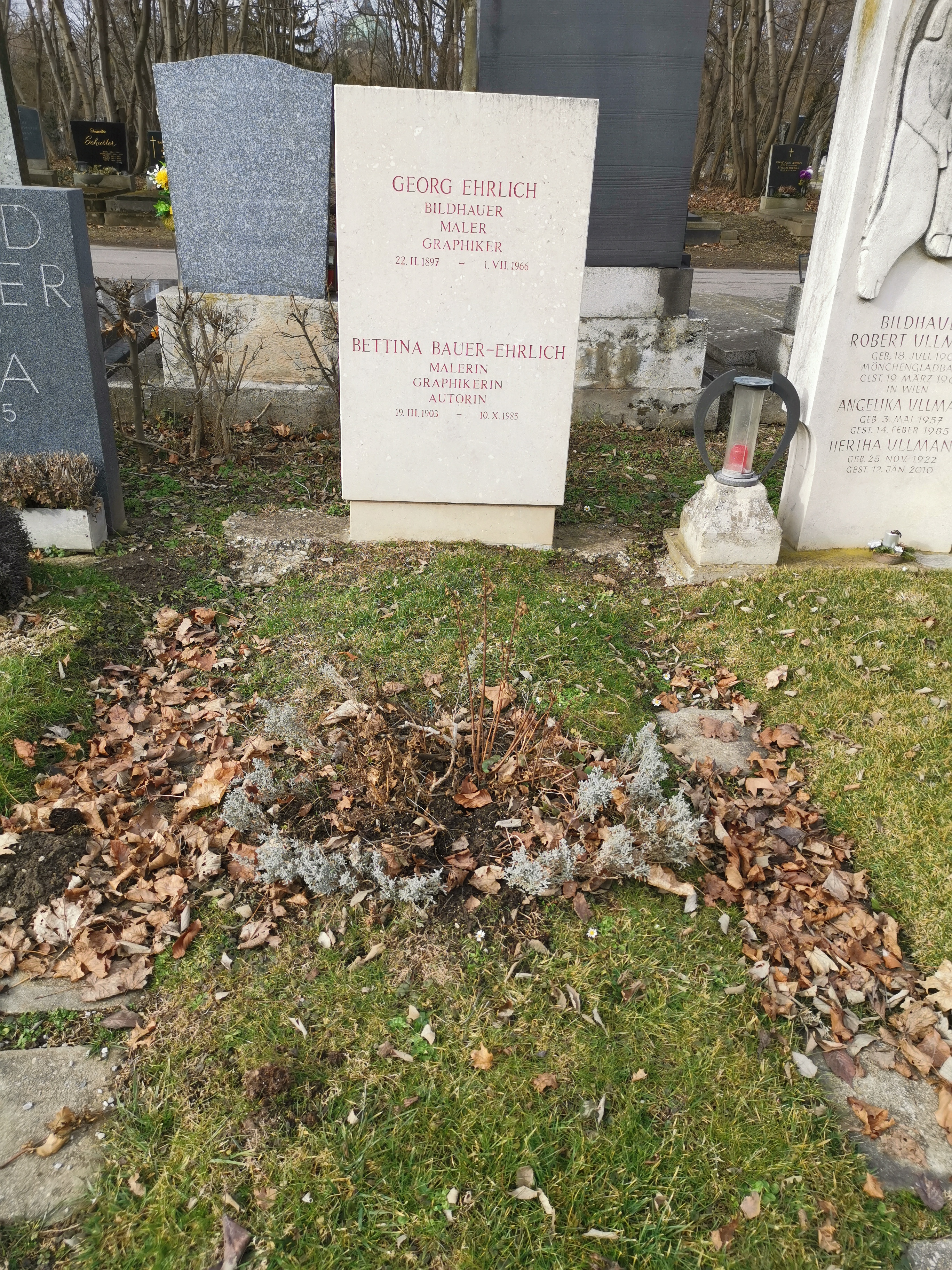 Grab Georg und Bettina Ehrlich auf dem Wiener Zentralfriedhof